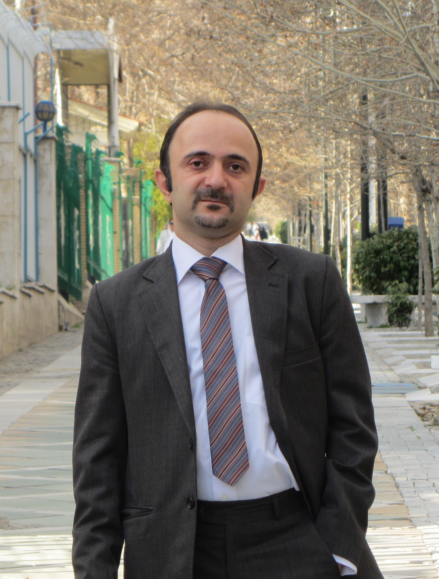 هوتن دولتی